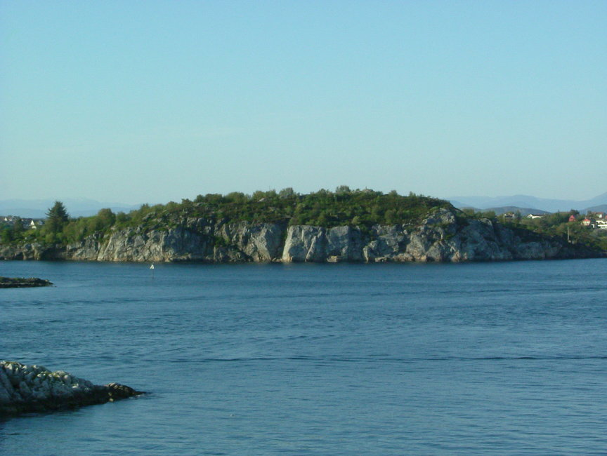 Steinsøy